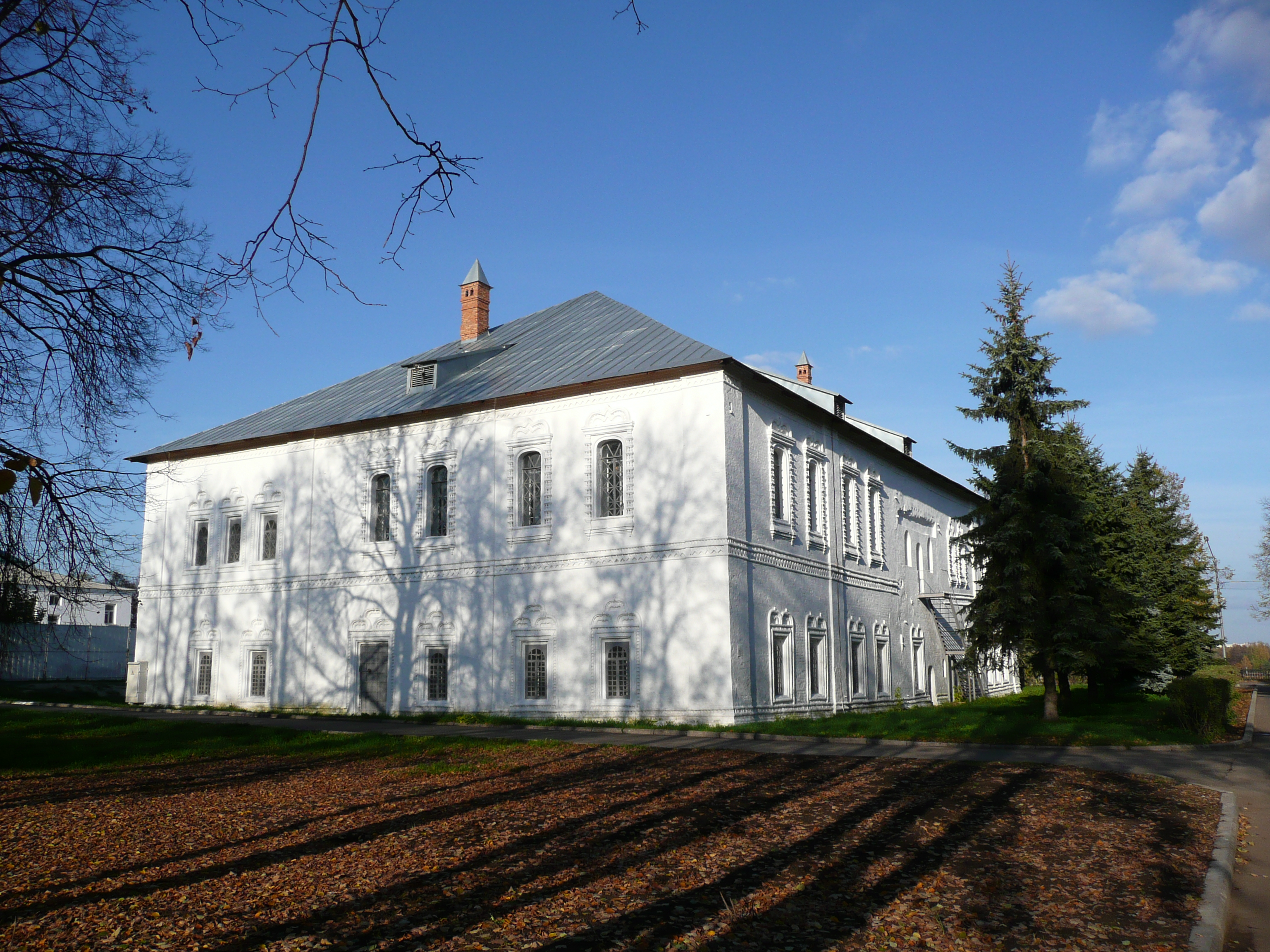 Metropolitan's Palace in Yaroslavl